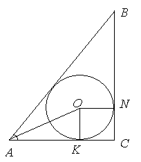 Вписане коло